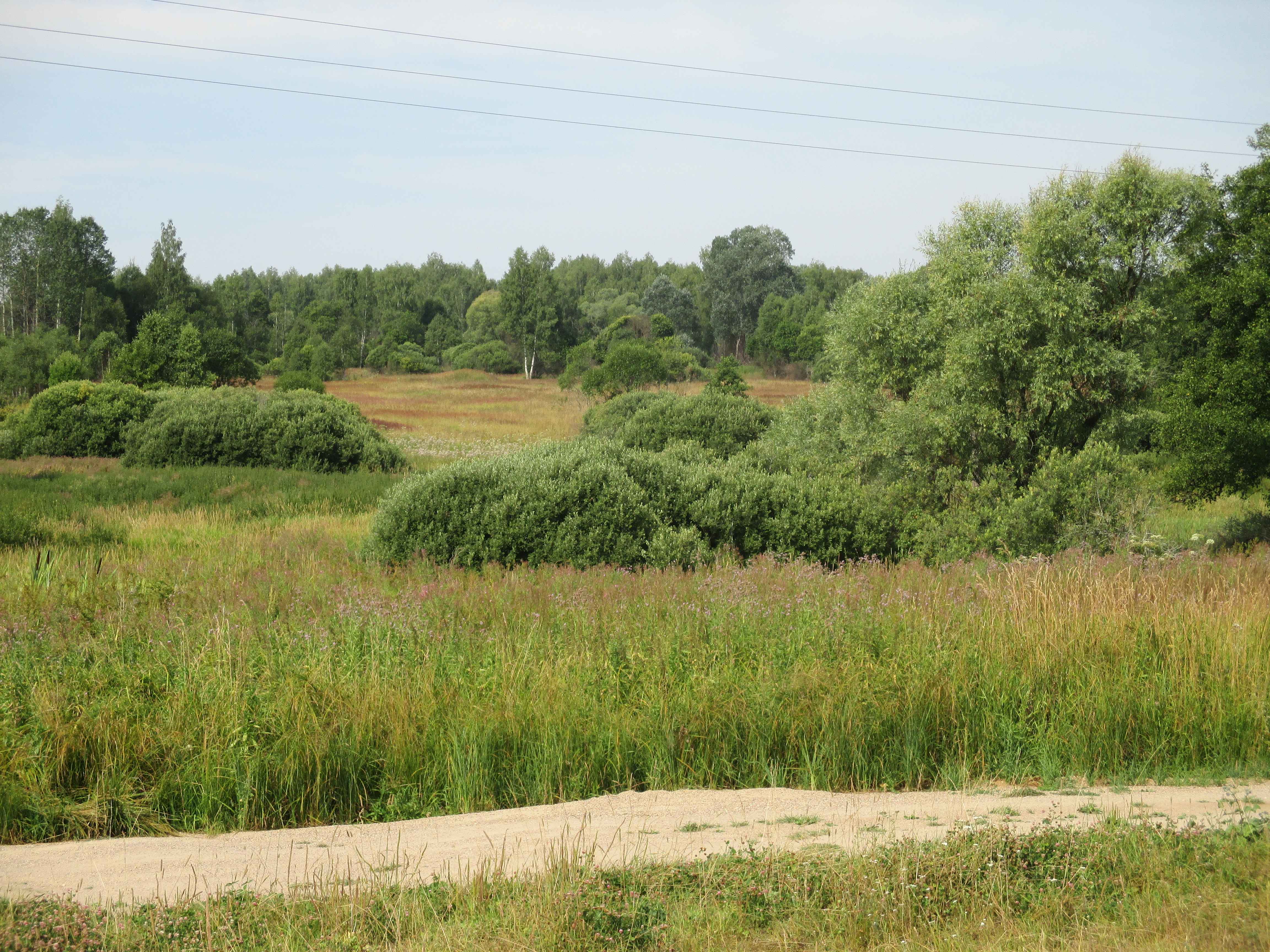 Находится на месте деревни Клины, разорённой в ходе боёв в январе 1942-го года. Калужская область, Износковский район